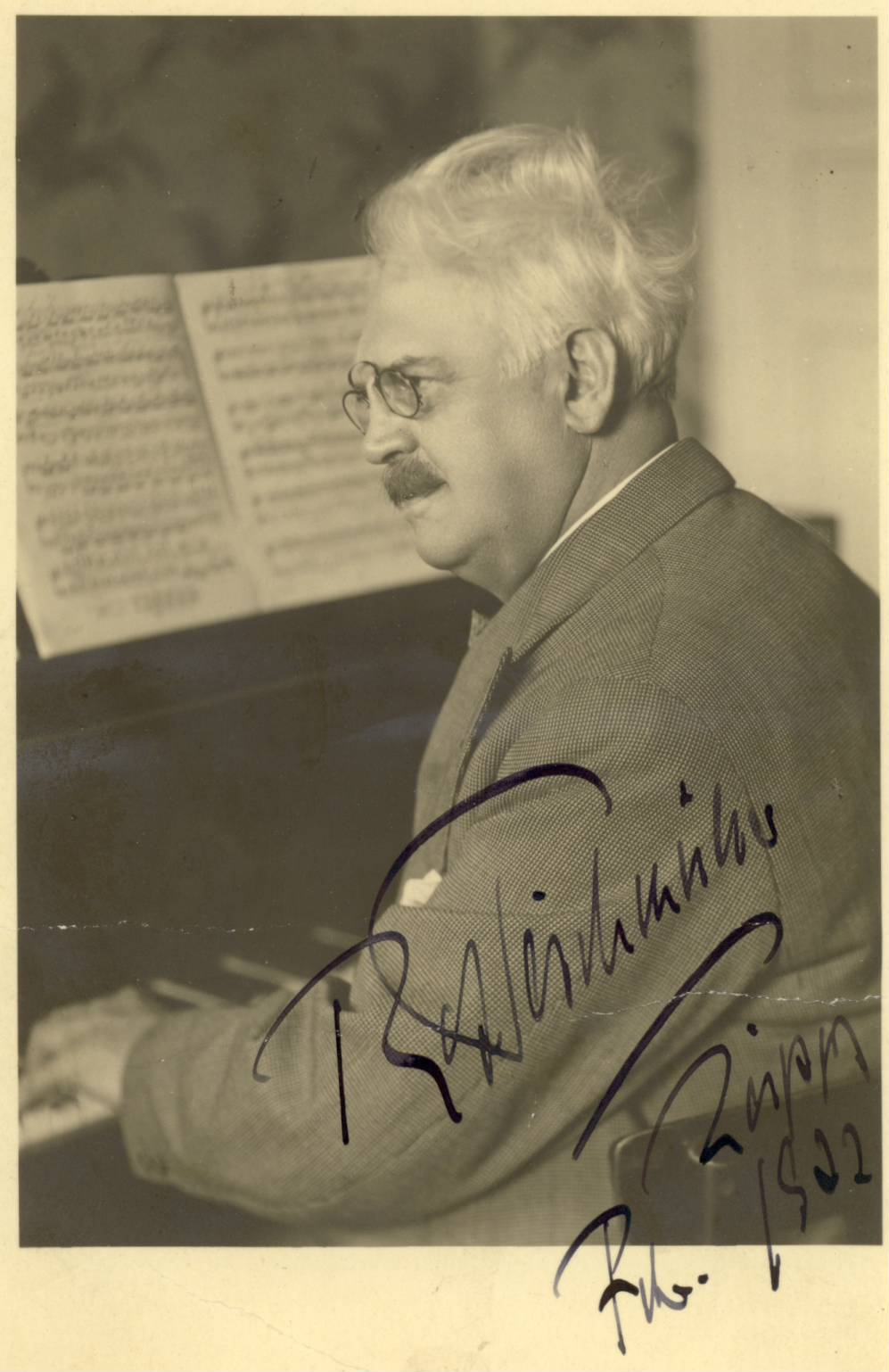 Robert Teichmüller (Foto mit eigenhändischer Unterschrift; gewidmet seiner Schülerin Ingrid Marianne Nagler - Tochter von Karl Friedrich Nagler)